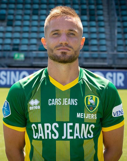 Aaron Meijers